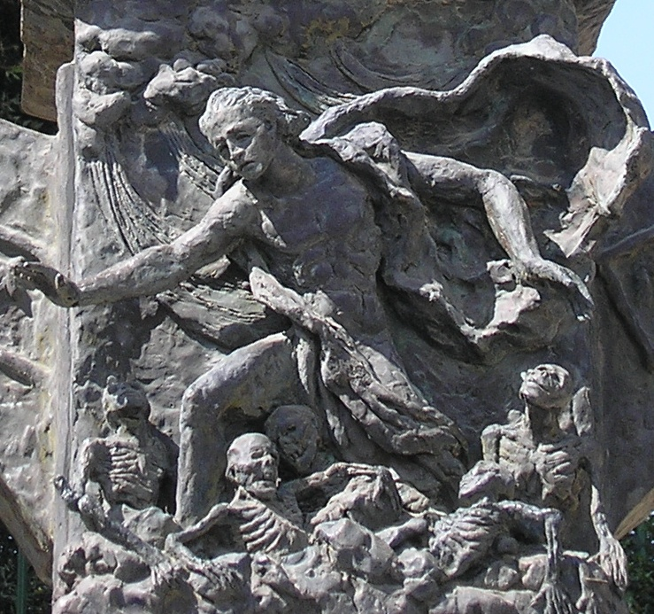 The Knesset Menorah, Jerusalem (detail - חזון העצמות היבשות) Hesekiel, zentraler Arm des Leuchters über der ersten Verzweigung